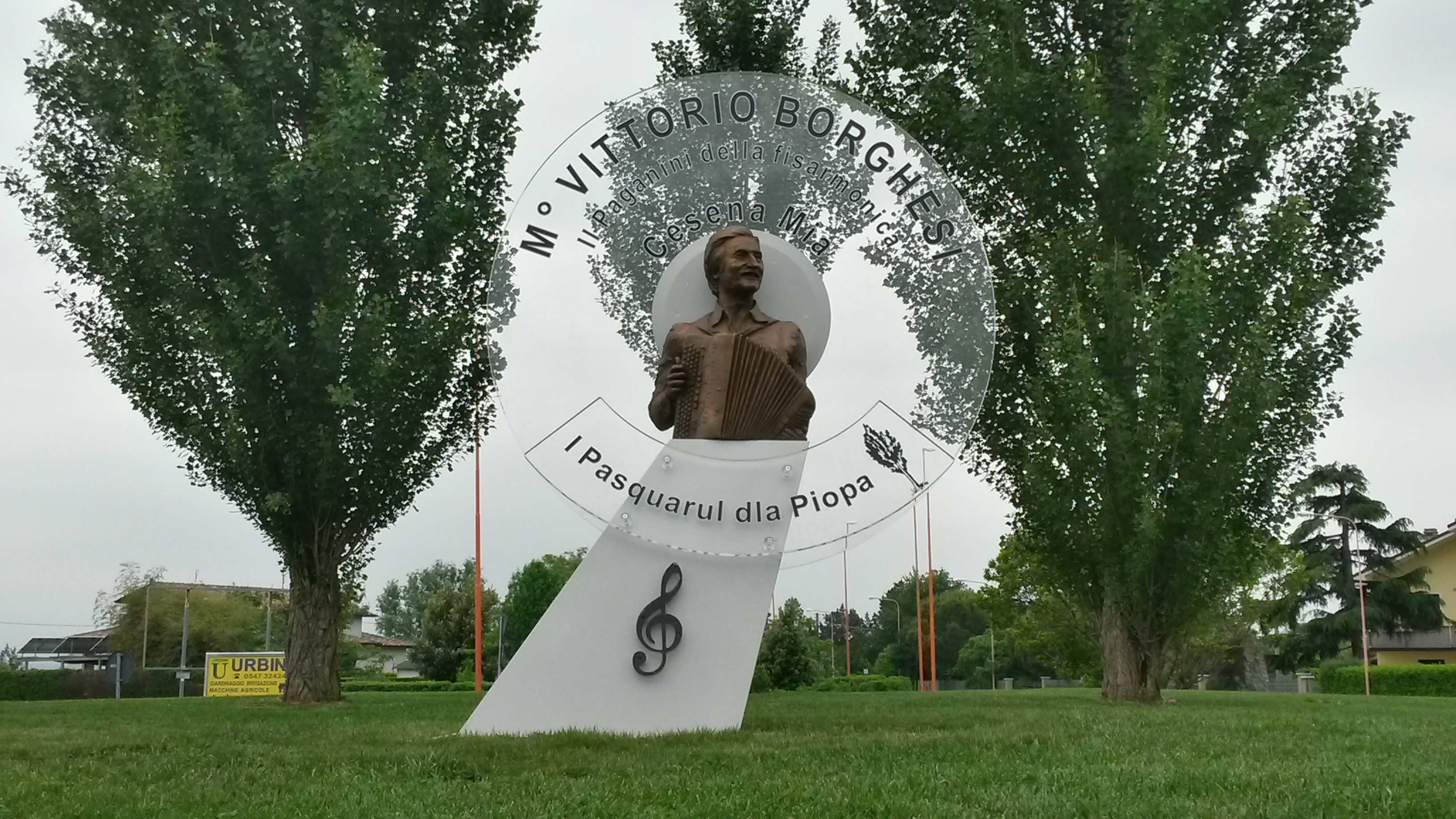 L'opera è costituita da un busto in bronzo (riproduzione di un’analoga opera in terracotta realizzata da Tito Neri nel 1980) completato dalla sagoma in plexiglas di un disco 45 giri. È posta all'interno della rotonda Pioppa, a sud dell'abitato di Pioppa di Cesena (FC), Italia.